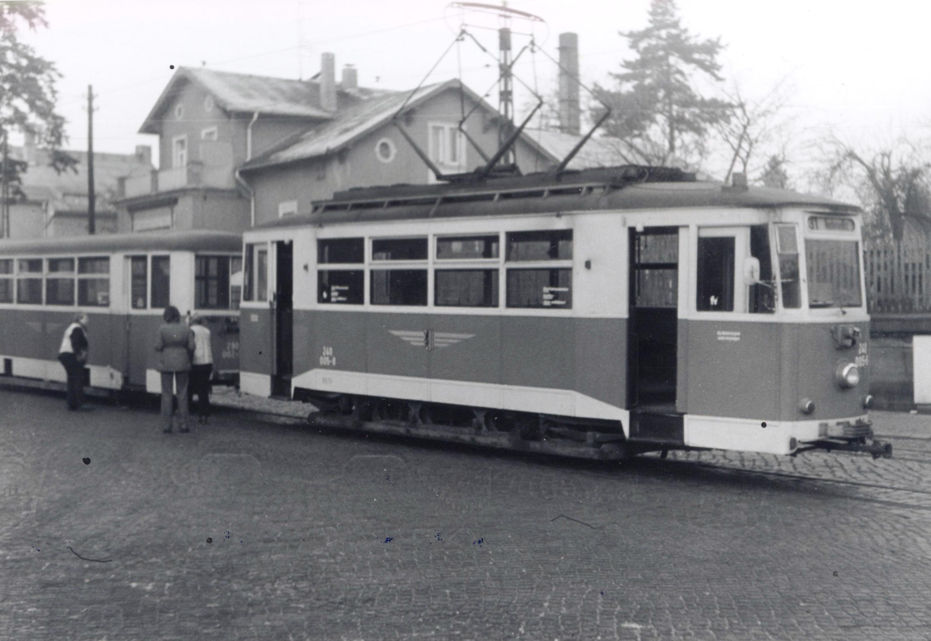 Ein Zug der Lockwitztalbahn am letzten Betriebstag von Kreischa kommend in Niedersedlitz eingetroffen, an der Spitze Tw 240 005